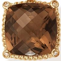 Smykkestein av røykkvarts.